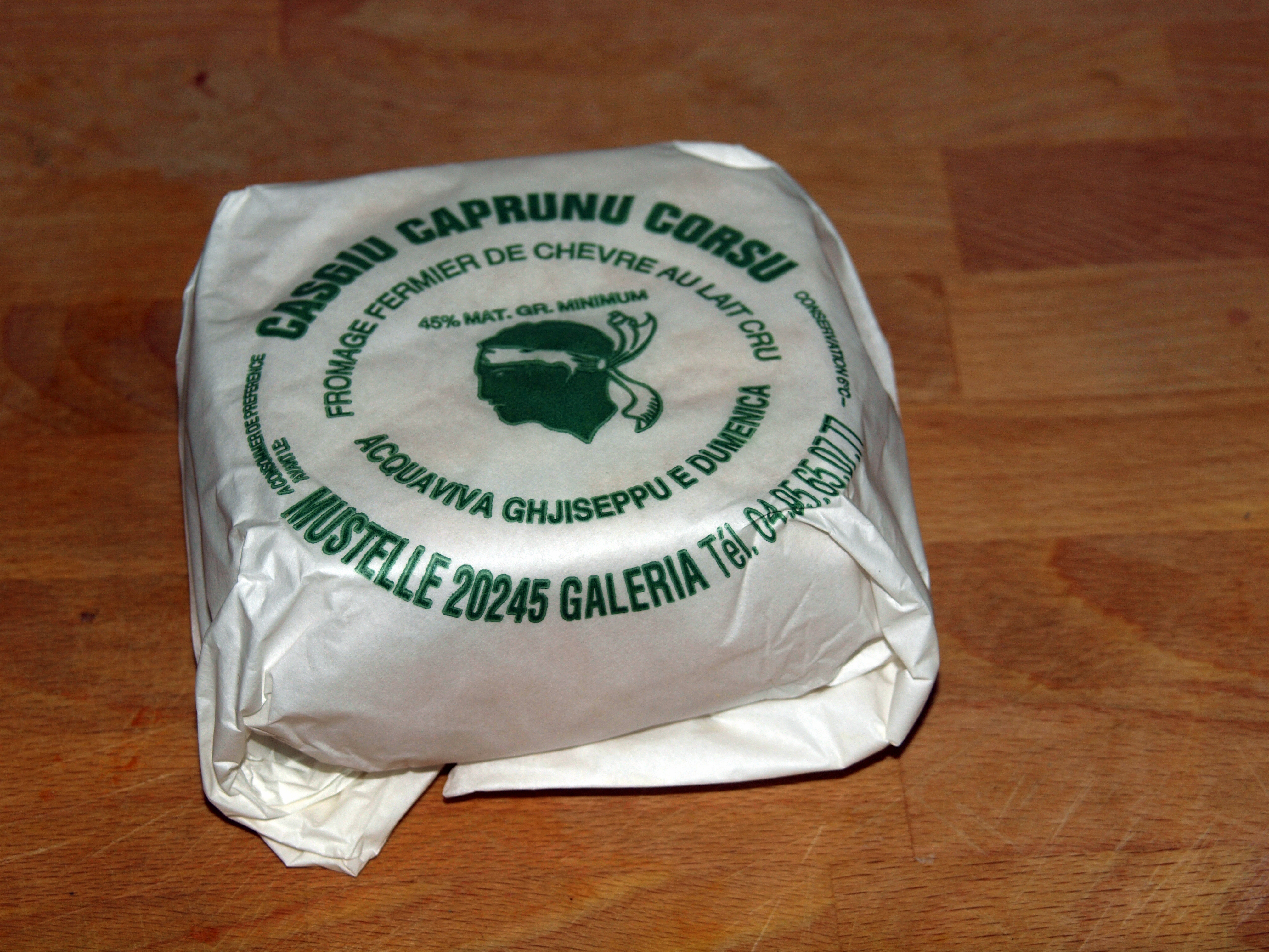 Galéria, Marsulinu (Corse) - Fromage de chèvre « Mustelle », type Calinzanincu, d'Acquaviva Joseph et Dominique